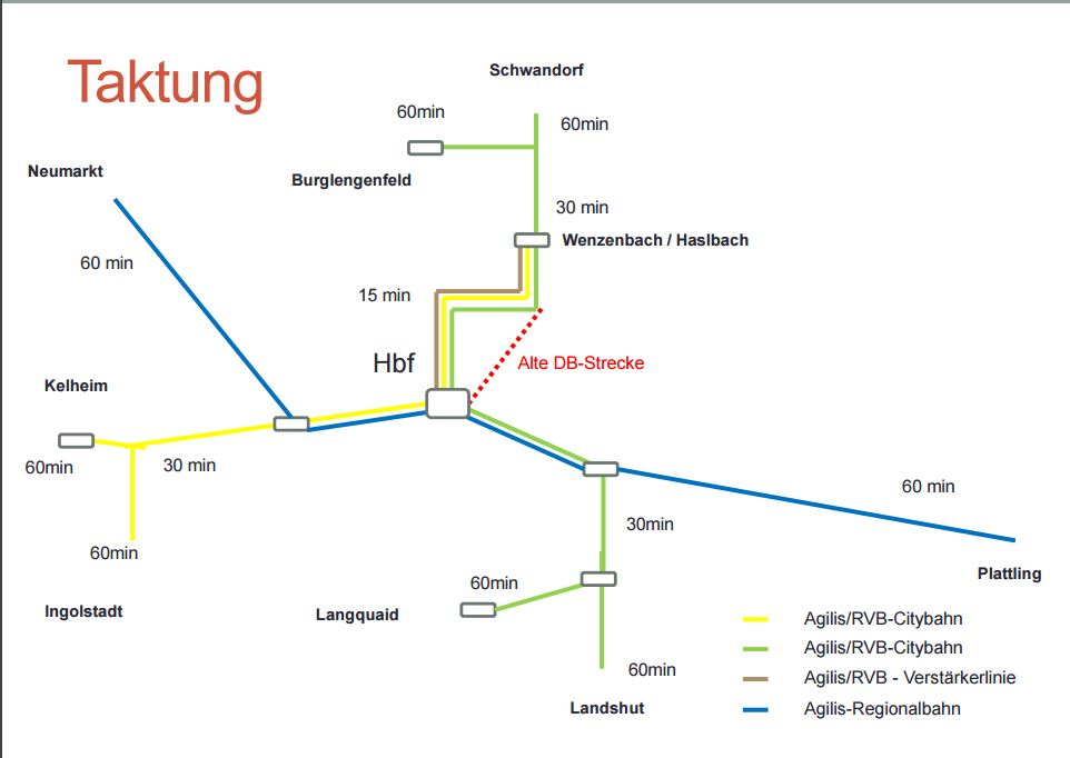 neuer Ansatz für eine Citybahn Regensburg